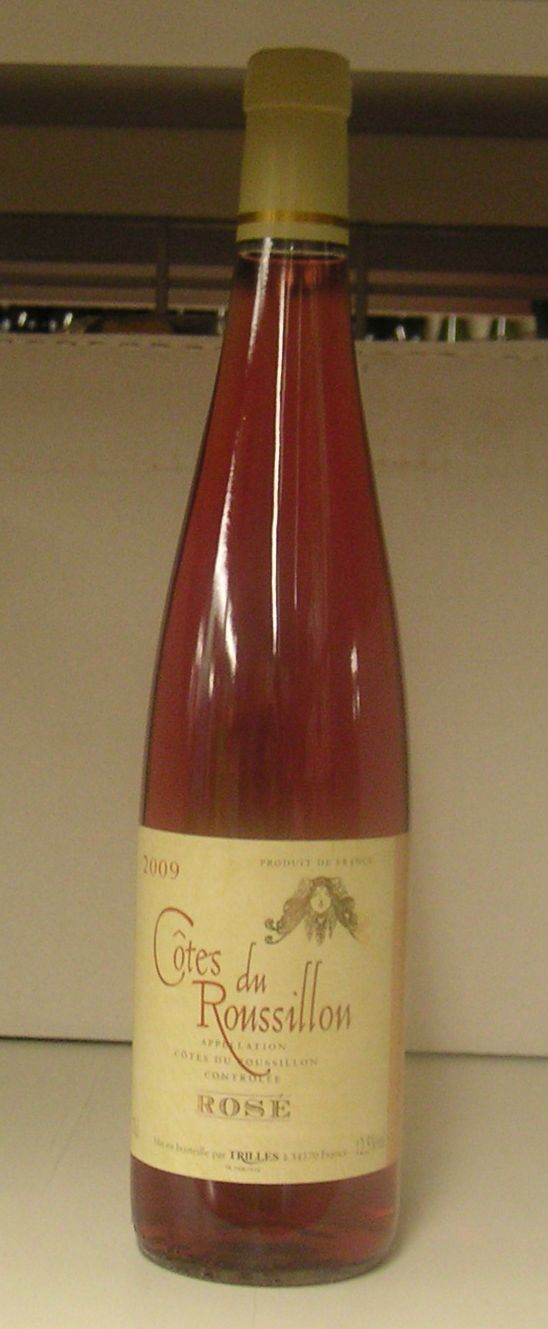 Ampolla de vi rosat amb denominacio d'origen "Costers del Rossello".